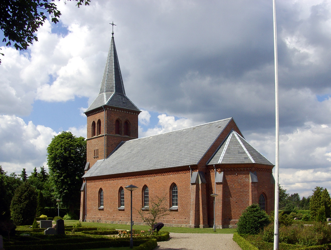 fra sydøst